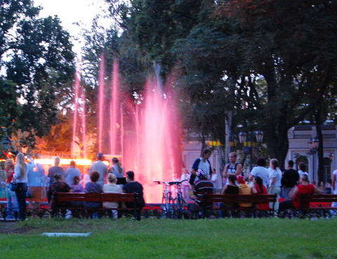 Фонтан в Горсаду, Одесса, июнь 2007